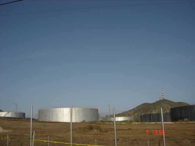 Refinería El Chaure ubicada cerca de Guanta, perteneciente al complejo refinador Puerto La Cruz.